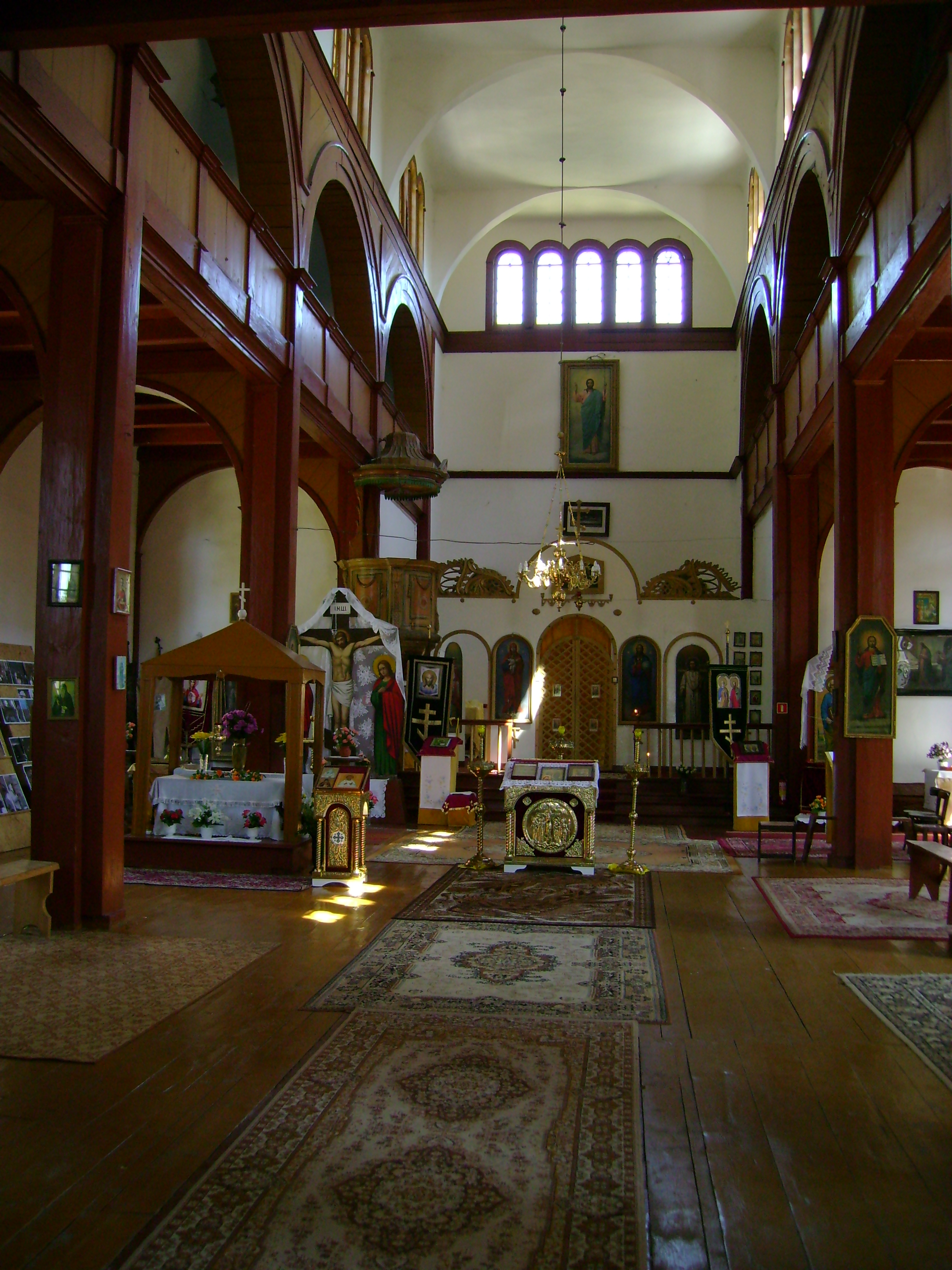 Dawny kościół ewangelicki w Lidzbarku Warmińskim